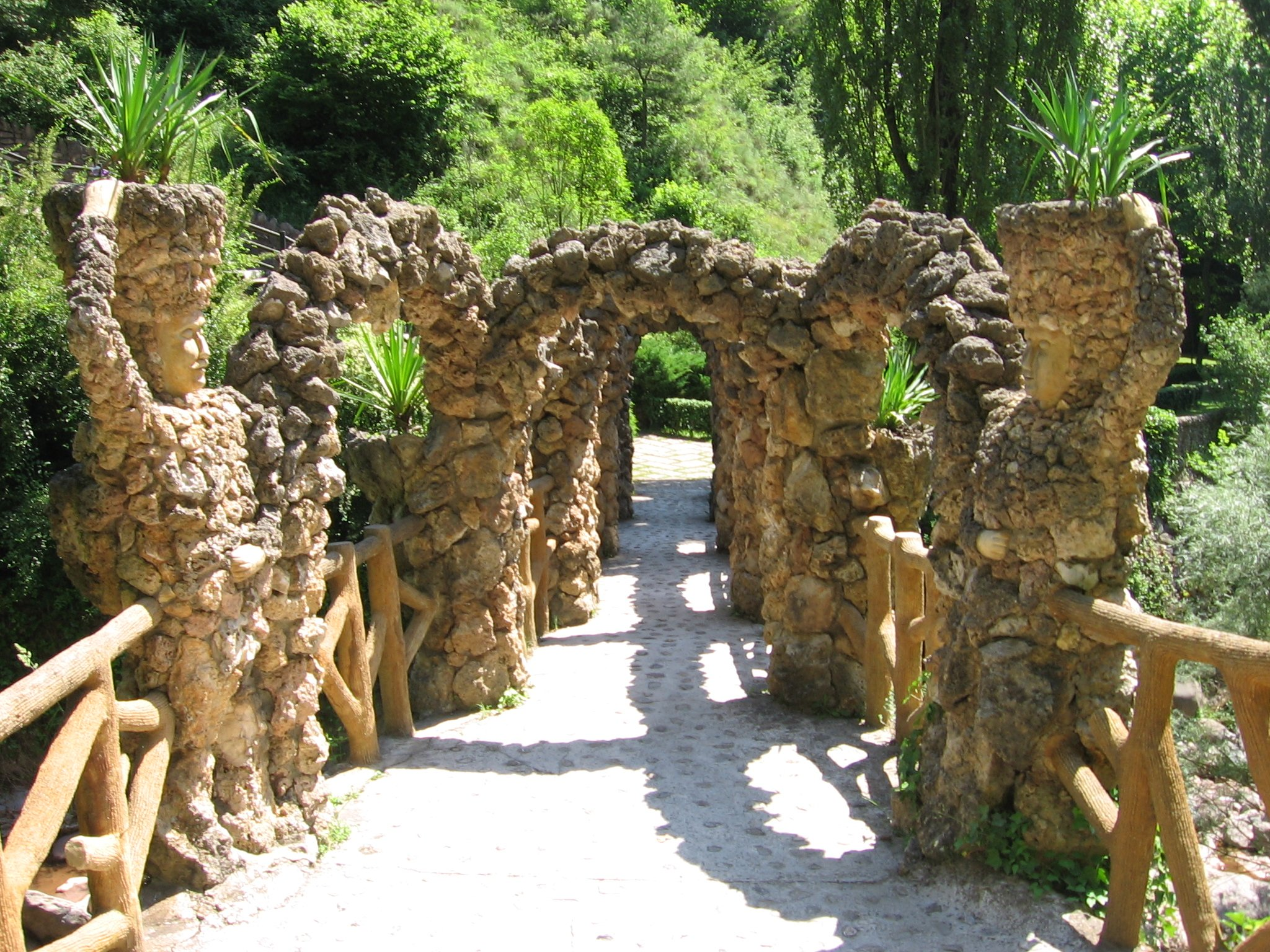 Jardines de Can Artigas, La Pobla de Lillet (Barcelona)